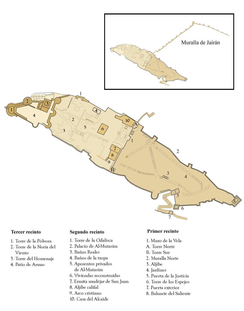 Plano de la Alcazaba de Almería y muralla de San Cristóbal con indicación de sus principales elementos. Almería, Andalucía, España.